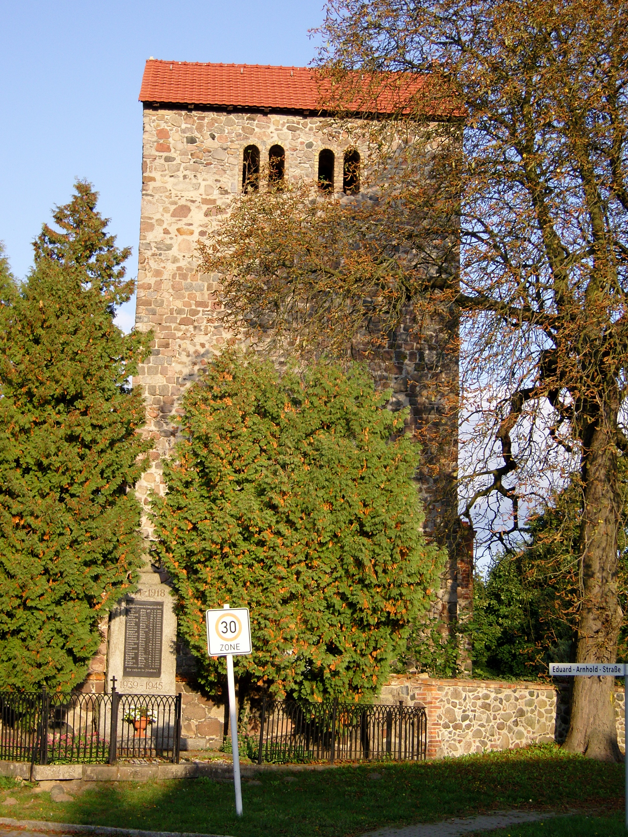 Romanischer Kirchturm der Dorfkirche von Hirschfelde in der Stadt Werneuchen in Brandenburg.